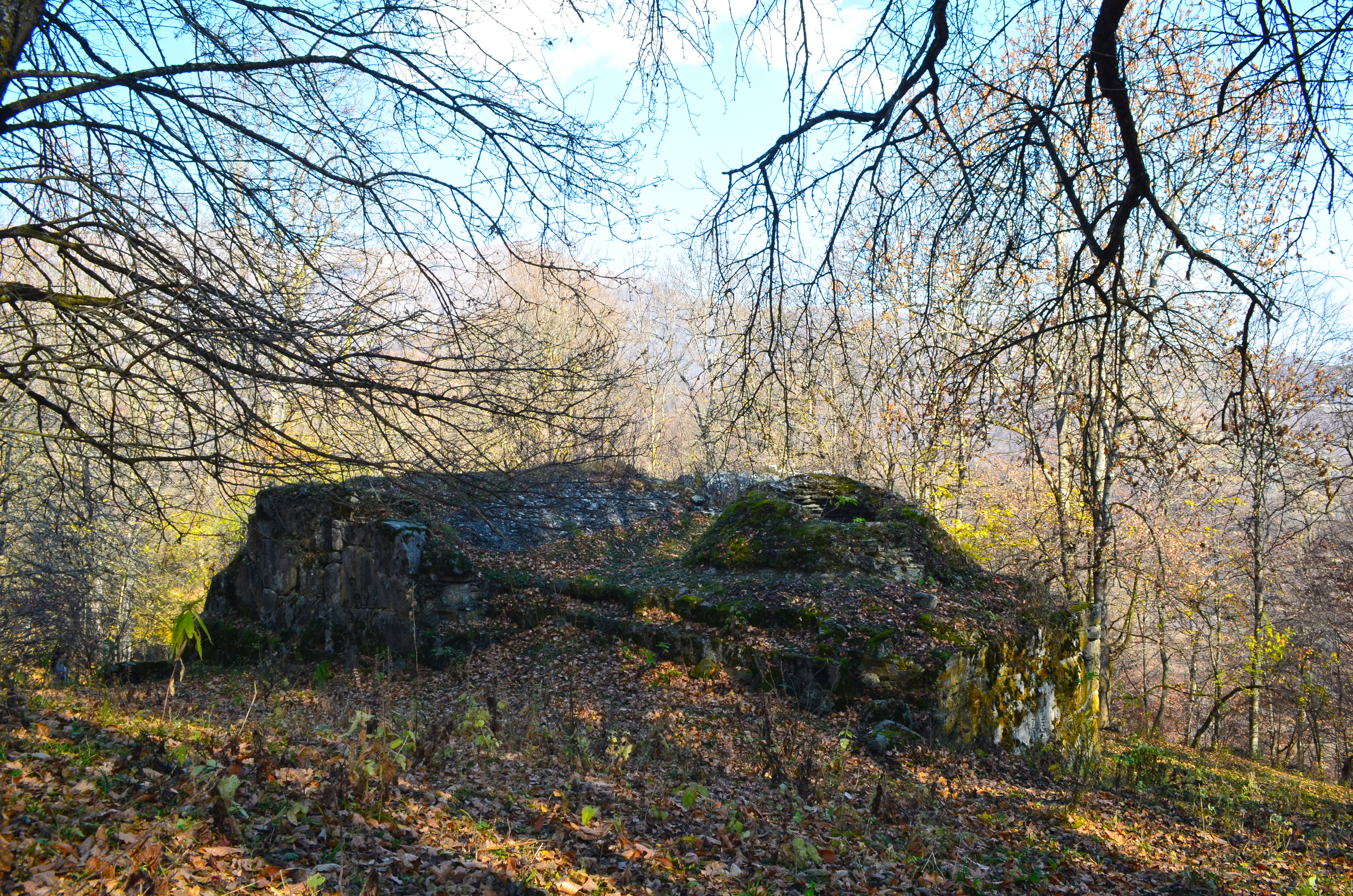 Դիլիջան քաղաքից 3.5 կմ ամ, գետի աջափնյա անտառածածկ սարահարթի վրա, Ջուխտակ վանքի դիմացի լեռնալանջին: 3/145